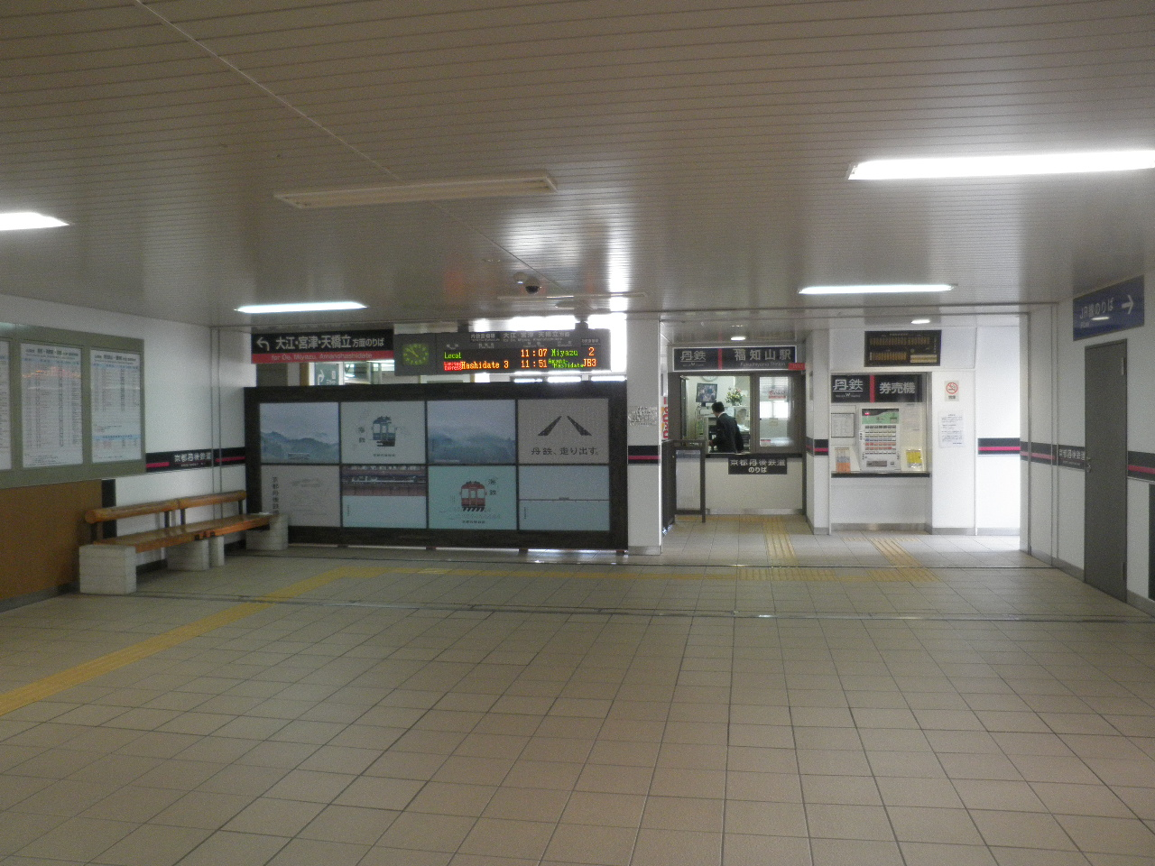 JRと京都丹後鉄道との乗り換え改札口